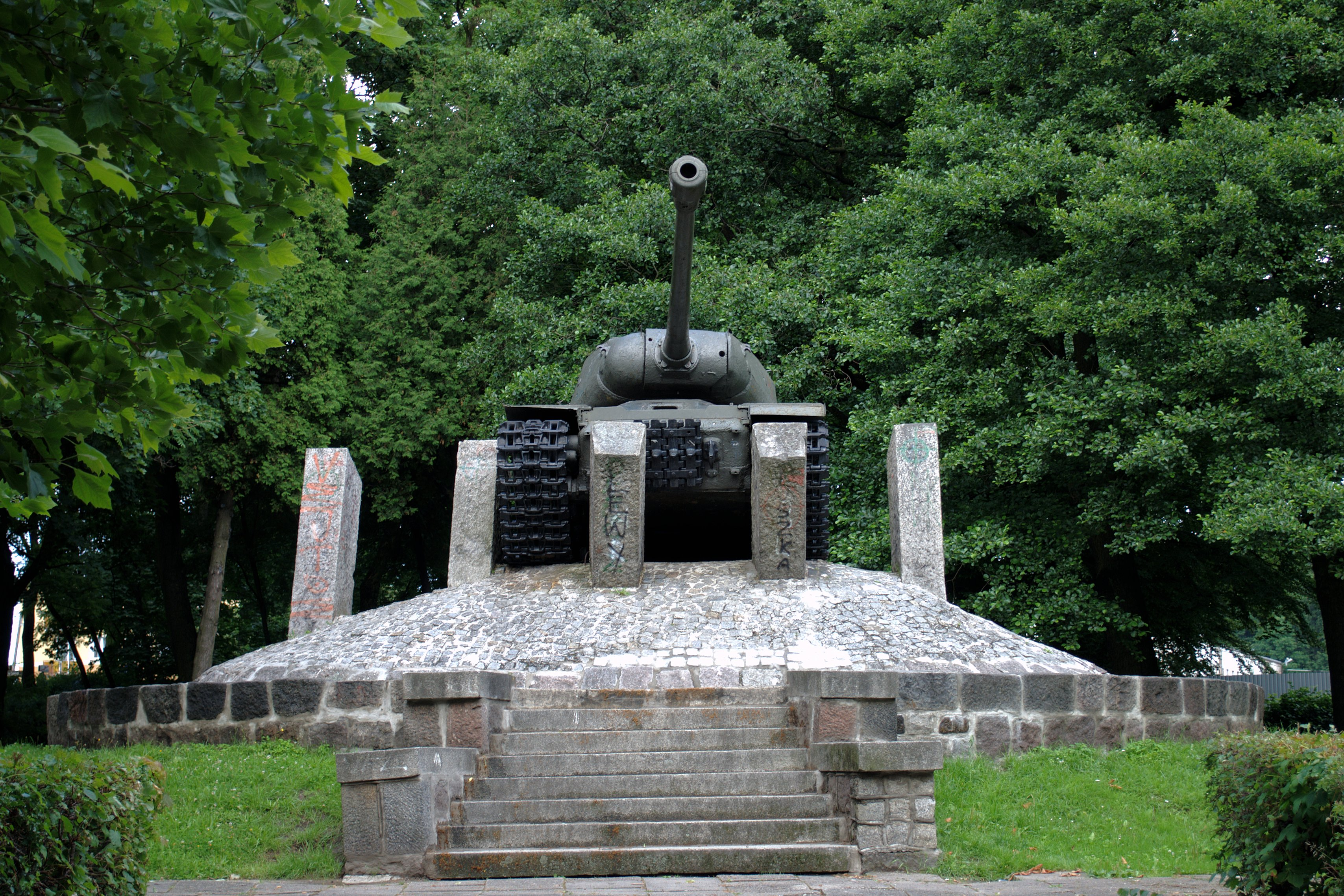 Lębork. Czołg IS-2 na pomniku w parku Chrobrego.